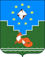 Герб Мирнинского района (2007 год), Республика Саха (Якутия)